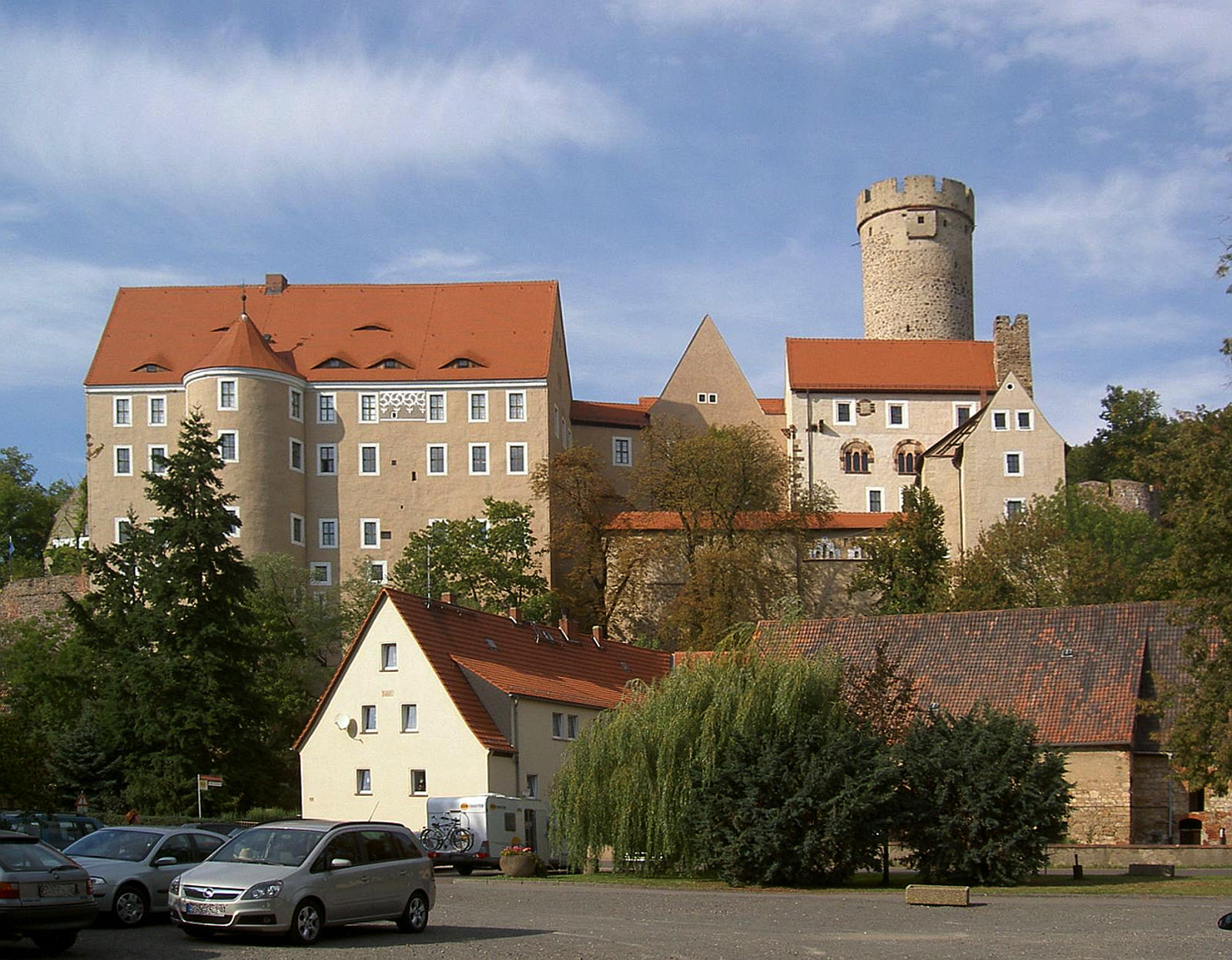 Burg Gnandstein vom Parkplatz aus fotografiert